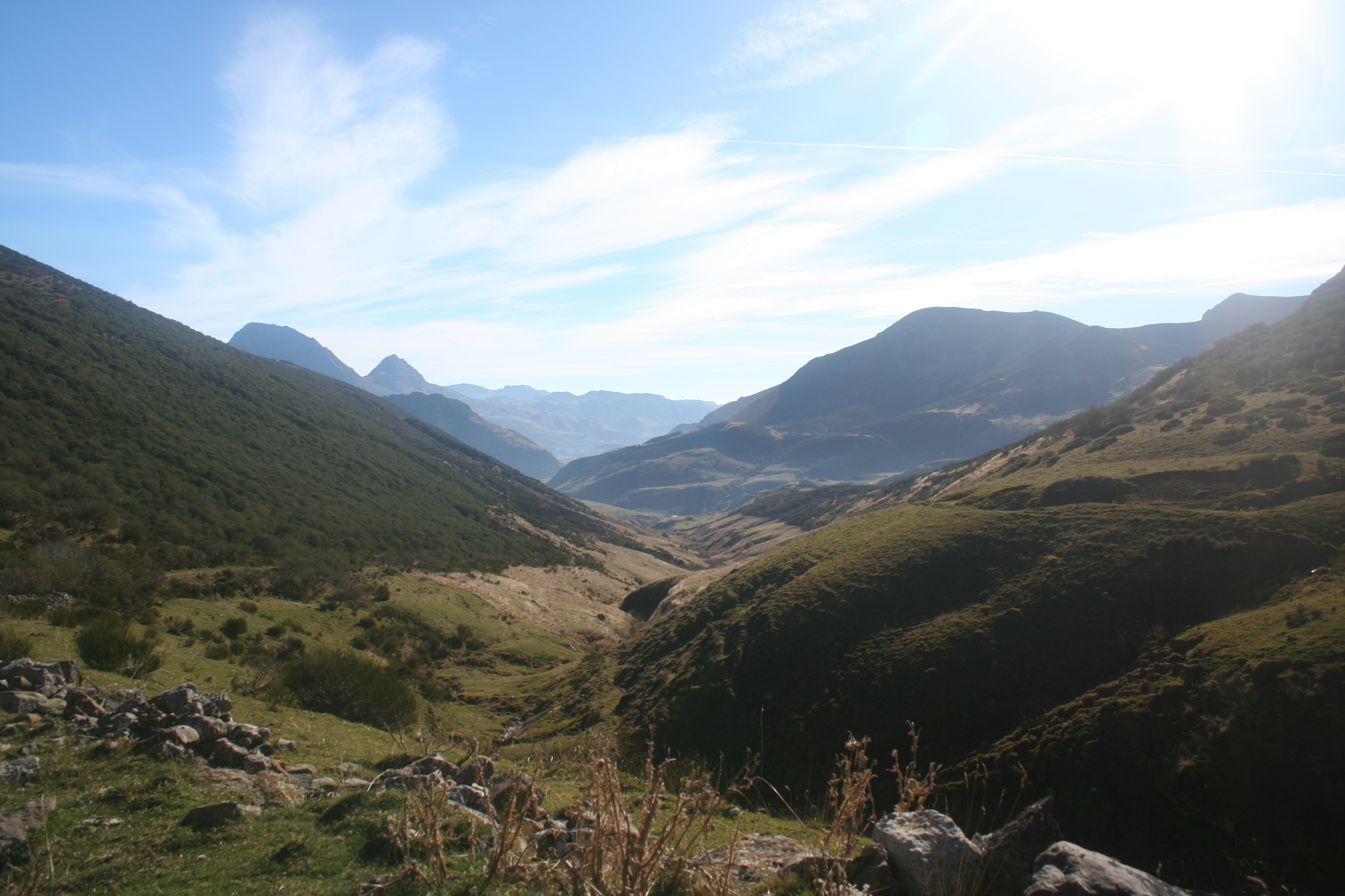 Camino Real Puerto de La Mesa entre Torrestío en la provincia de León y Asturias